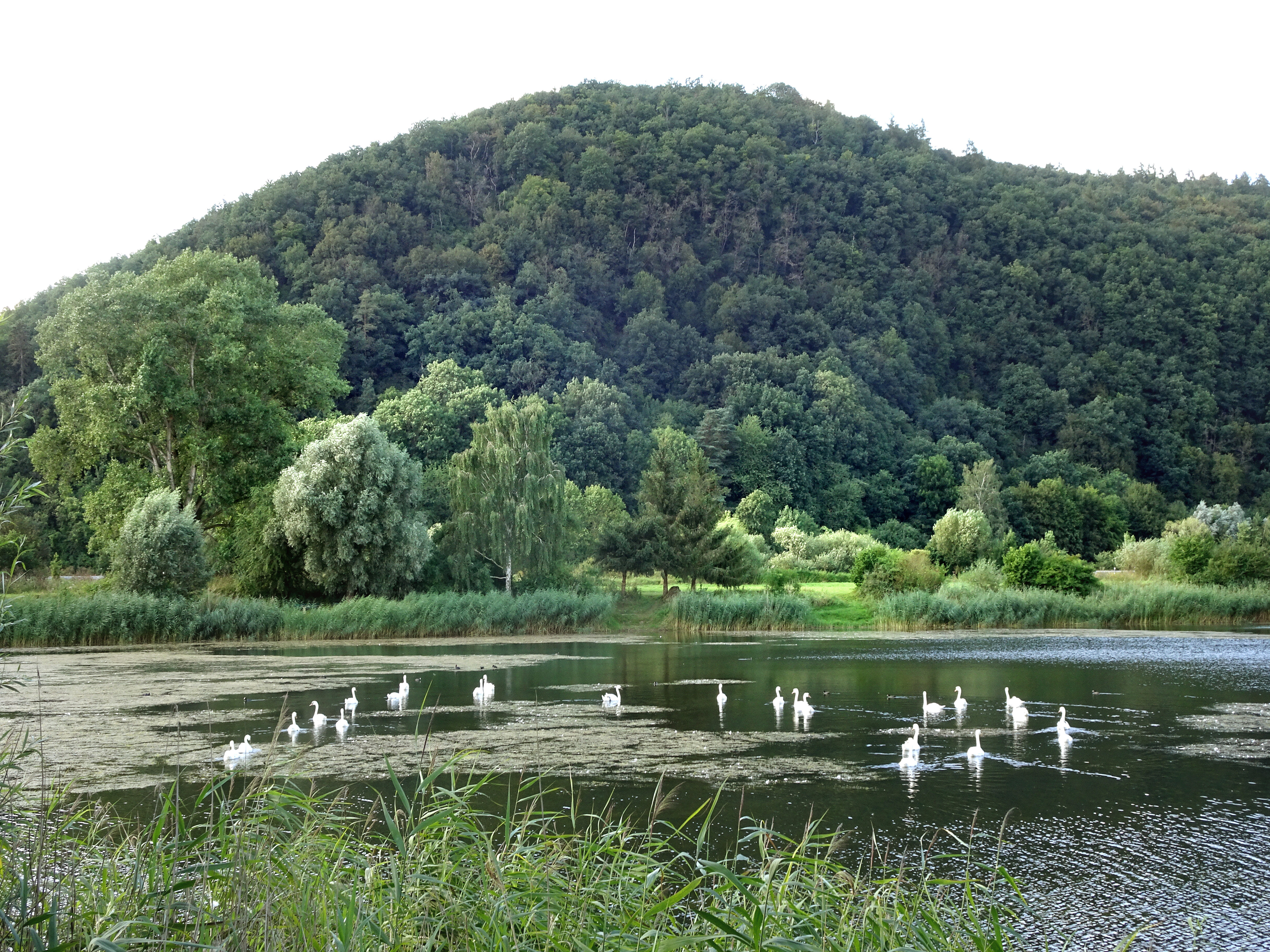 Blick vom Werratal-Radweg über Kiesteich und Werra-Aue auf den Eichenberg. FFH-Gebiet mit der Nummer 4826-302 und Naturschutzgebiet mit dem CDDA-Code 318328 im "Geo-Naturpark Frau-Holle-Land". 470' / N51°11.455'